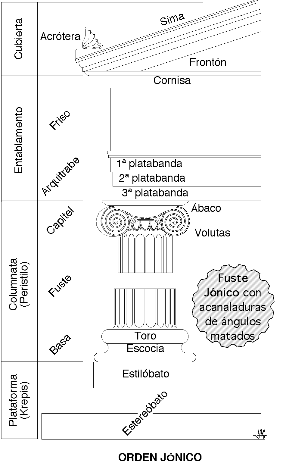 ORDEN JÓNICO Plataforma escalonada (krepis) Columnata (peristilo) Fuste con acanaladuras de aristas matadas Capitel Volutas Ábaco Entablamento Arquitrabe dividido en tres bandas (platabandas) Friso corrido Cornisa Cubierta Frontón Vertiente o Sima